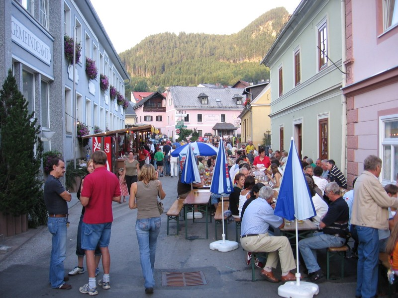 Neuberg an der Mürz / Österreich